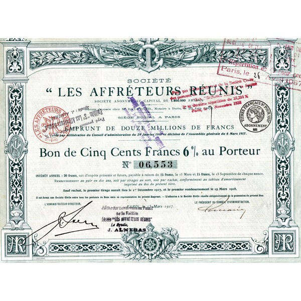 part juin 1917